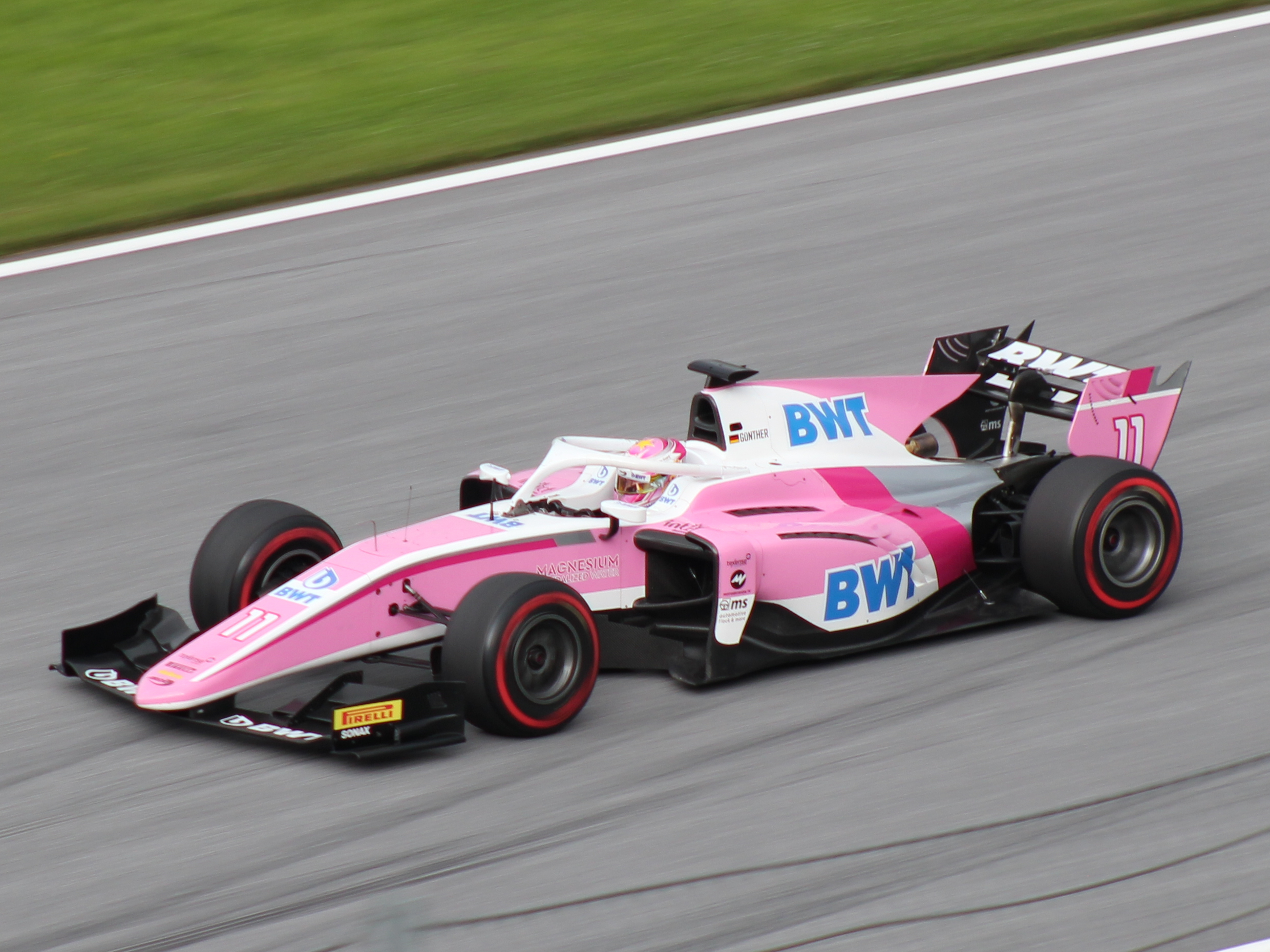 11 Maximilian Günther beim Rennwochenende in Österreich 2018 (1)